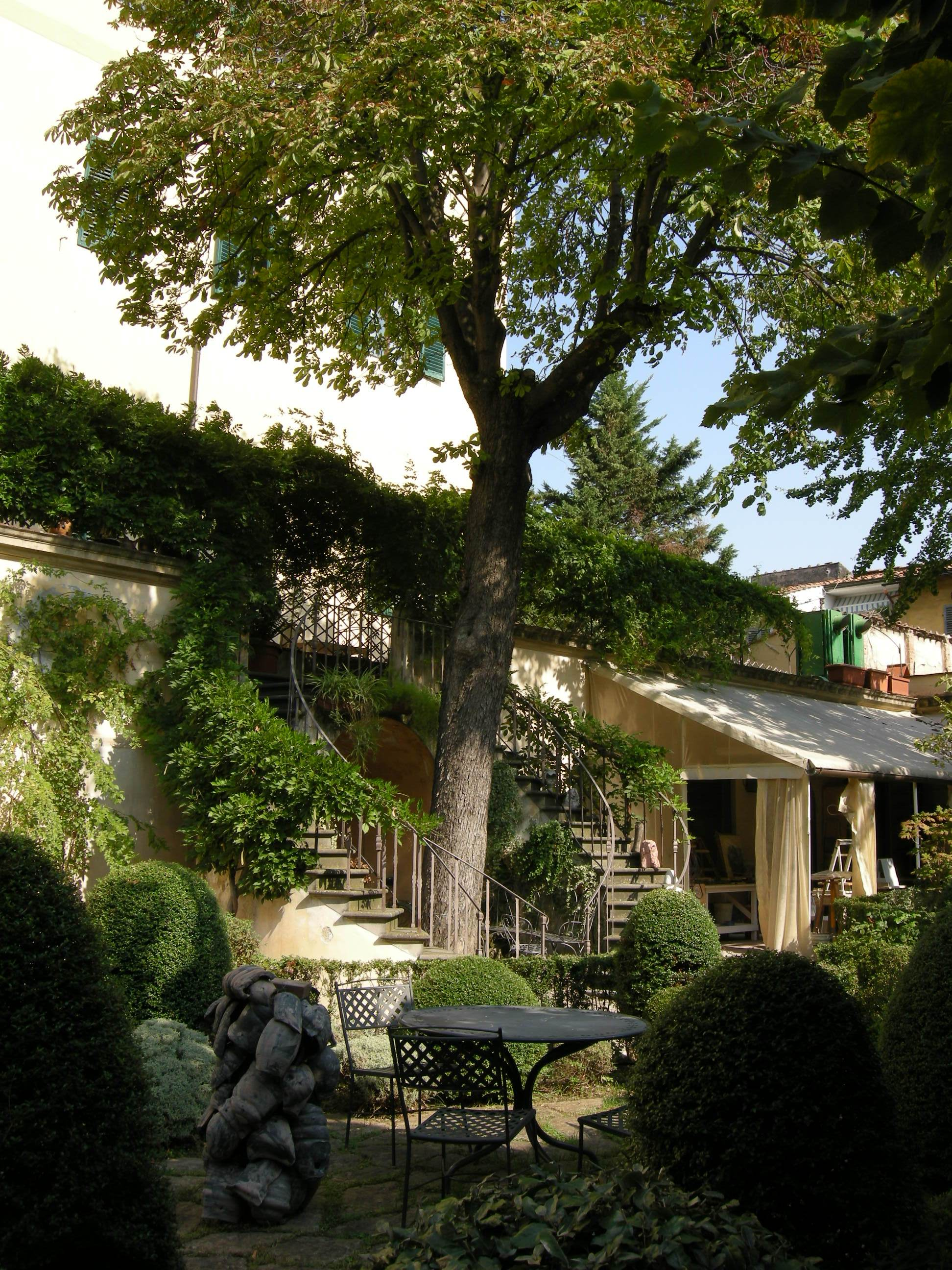 Palazzo dei cartelloni, giardino